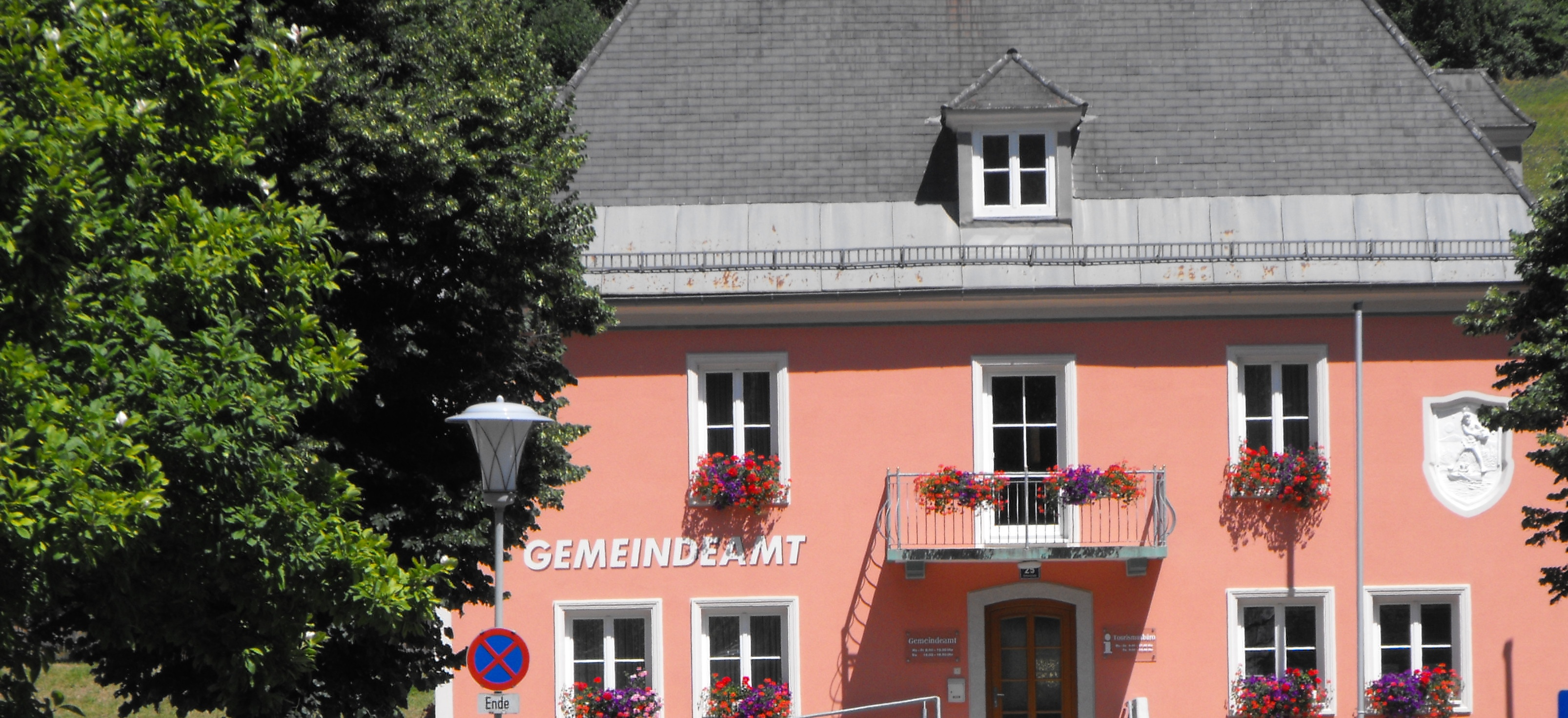 Das Gemeindeamt von Feld am See